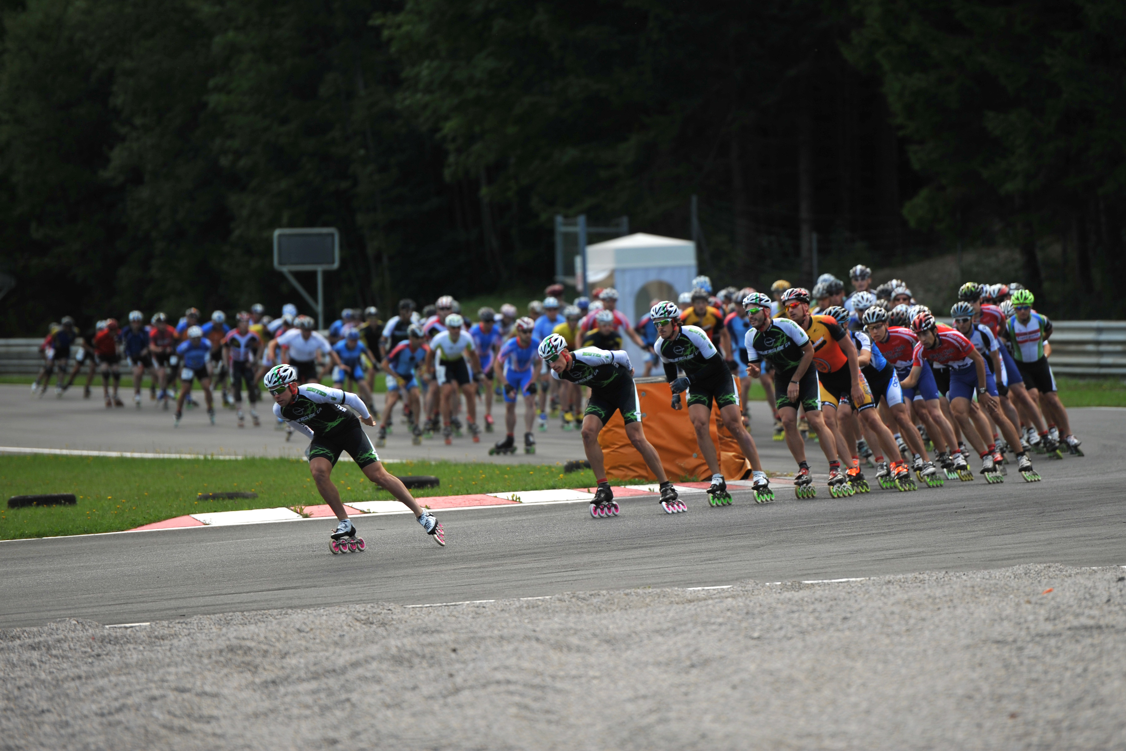 Skate the Ring Inline 2013: Hauptfeld kurz nach dem Start